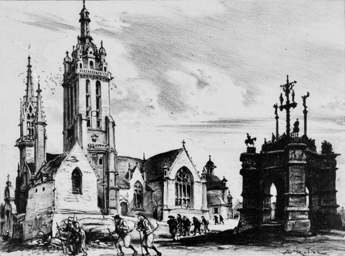 L'église et le calvaire de Pleyben vers 1900 (lithographie d'Albert Robida publiée dans "La vieille France, Bretagne" vers 1900)